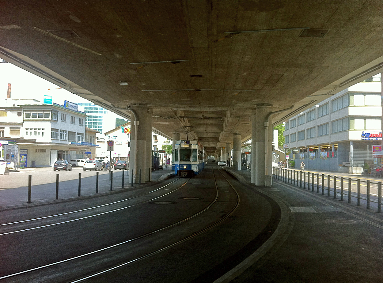 Tramhaltestelle "Schiffsbau" unter der Hardbrücke in Zürich